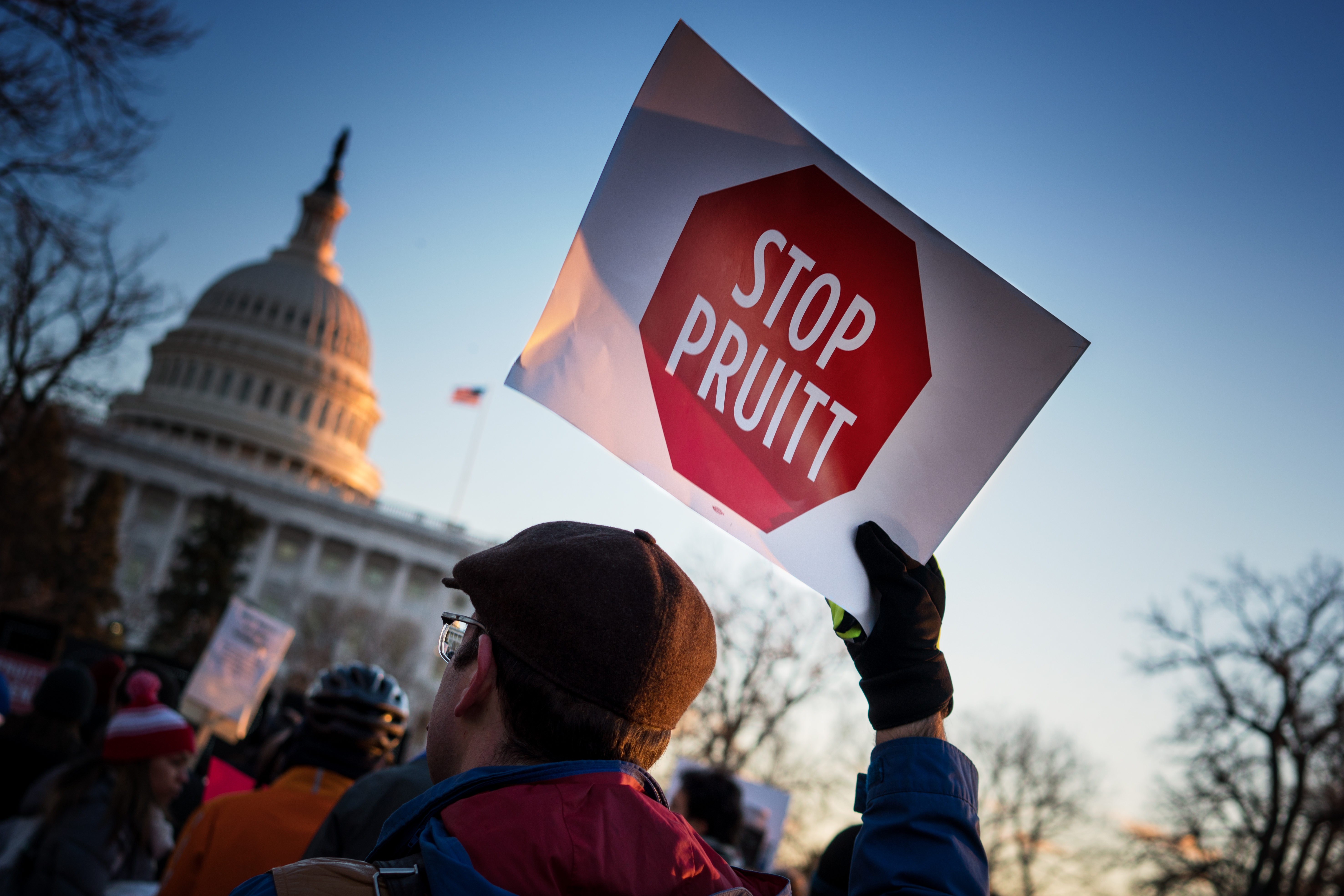 Opposition to Scott Pruitt.